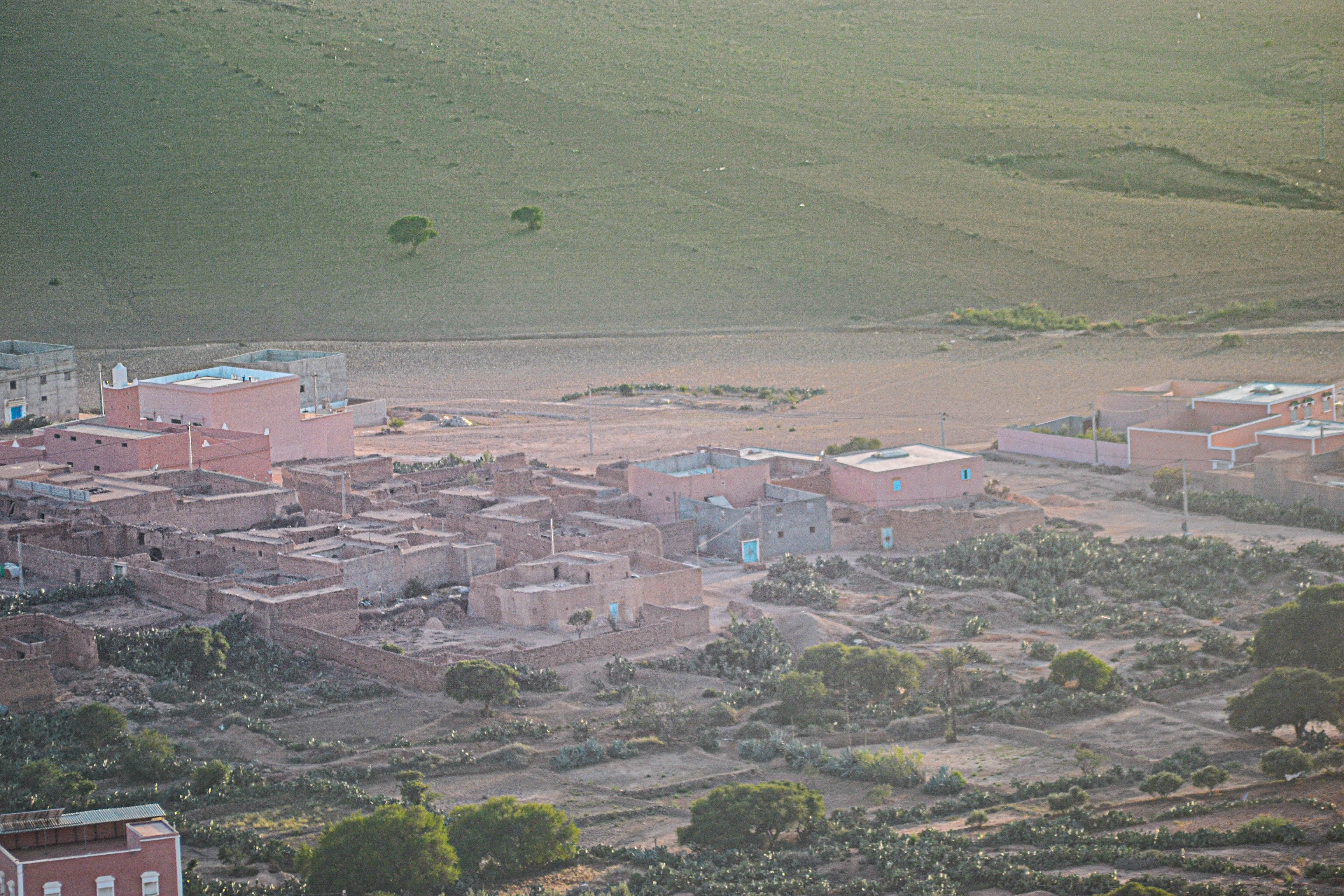 صورة لدوار الدخيلة جماعة وجان